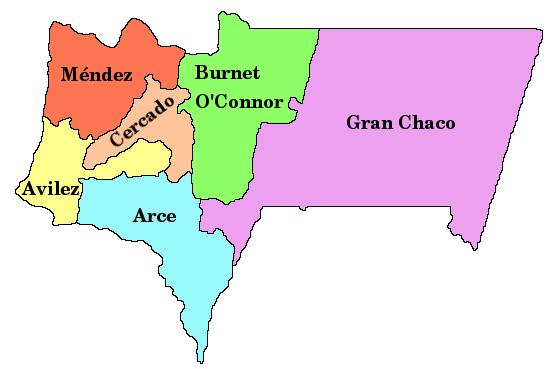 Carte du département de Tarija en Bolivie